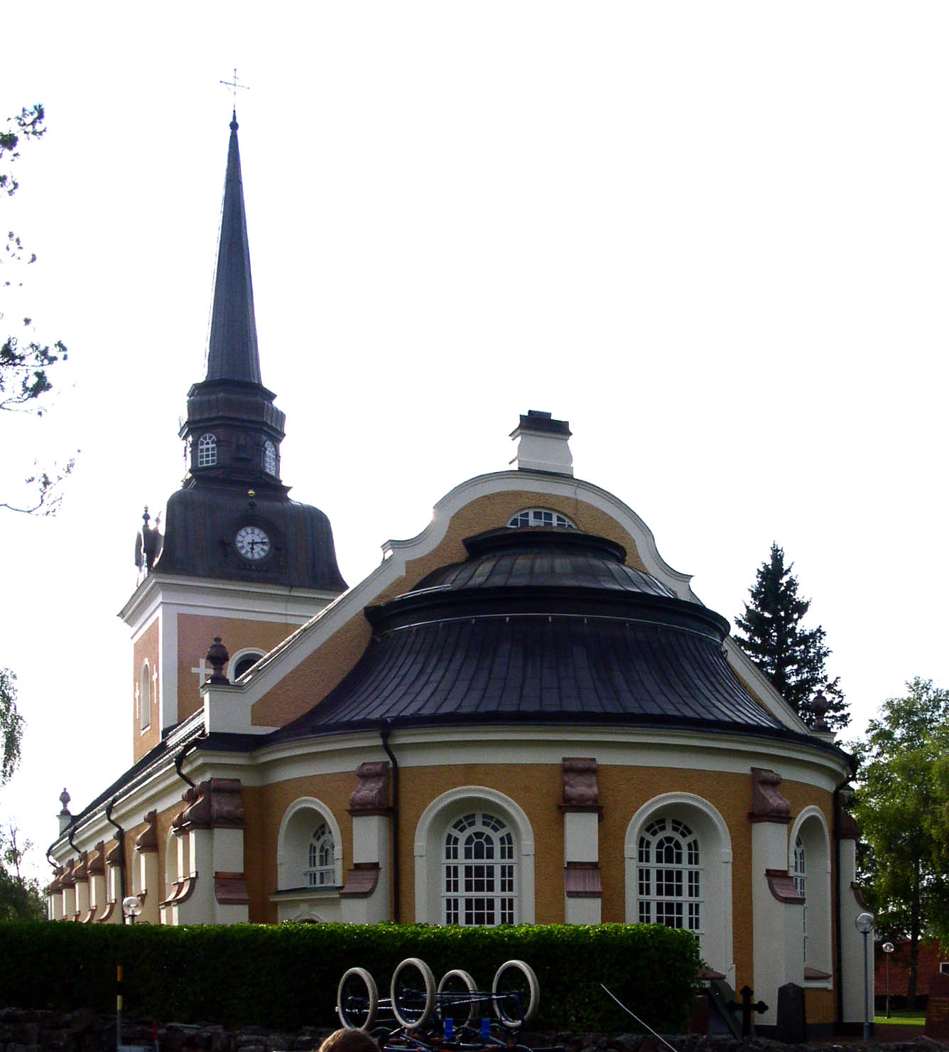 Älvdalens kyrka, Dalarna